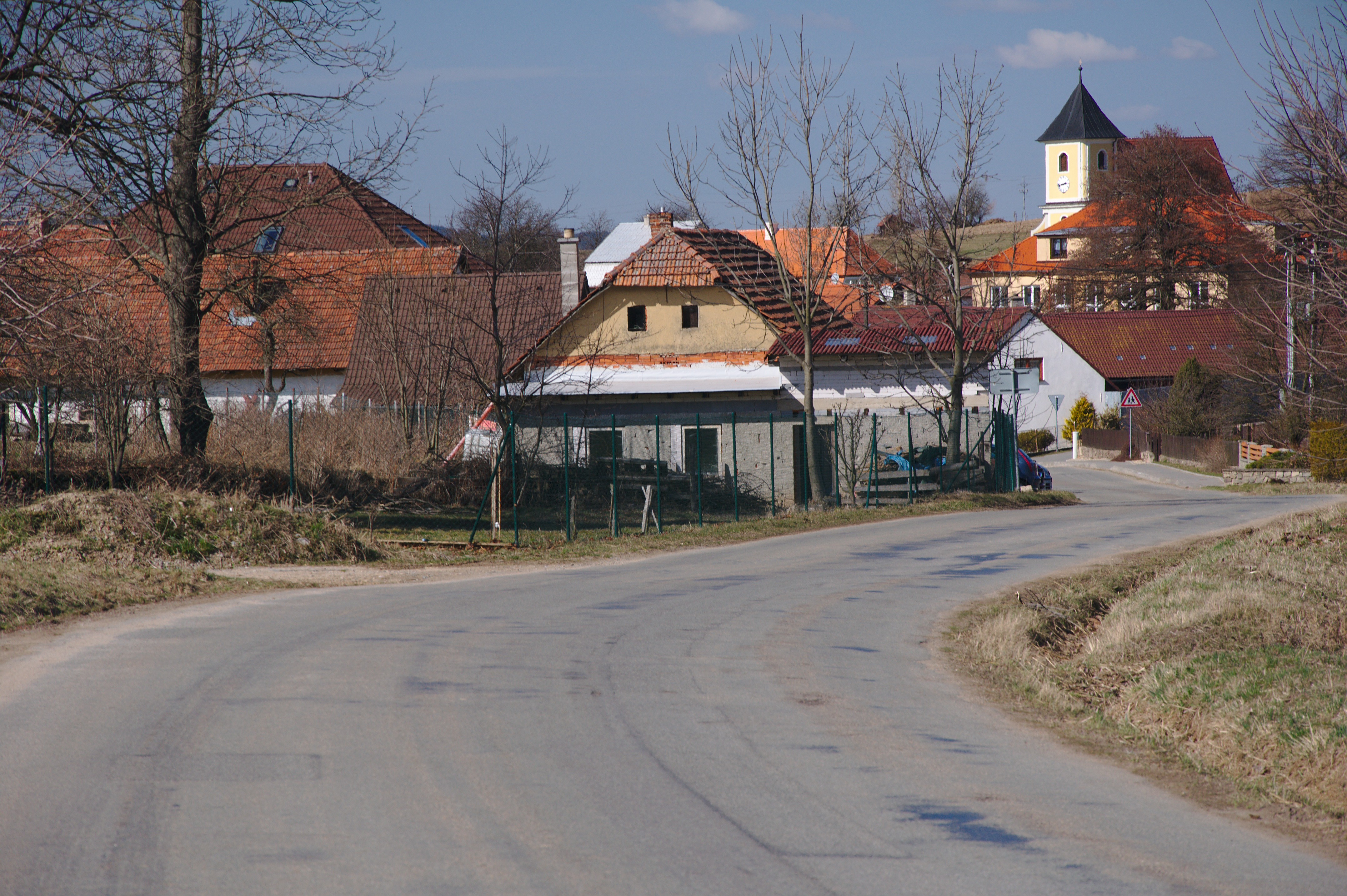 Obec od jihu, Černovice, okres Blansko